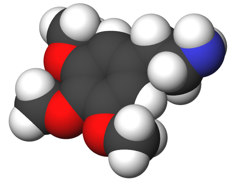 Mescaline